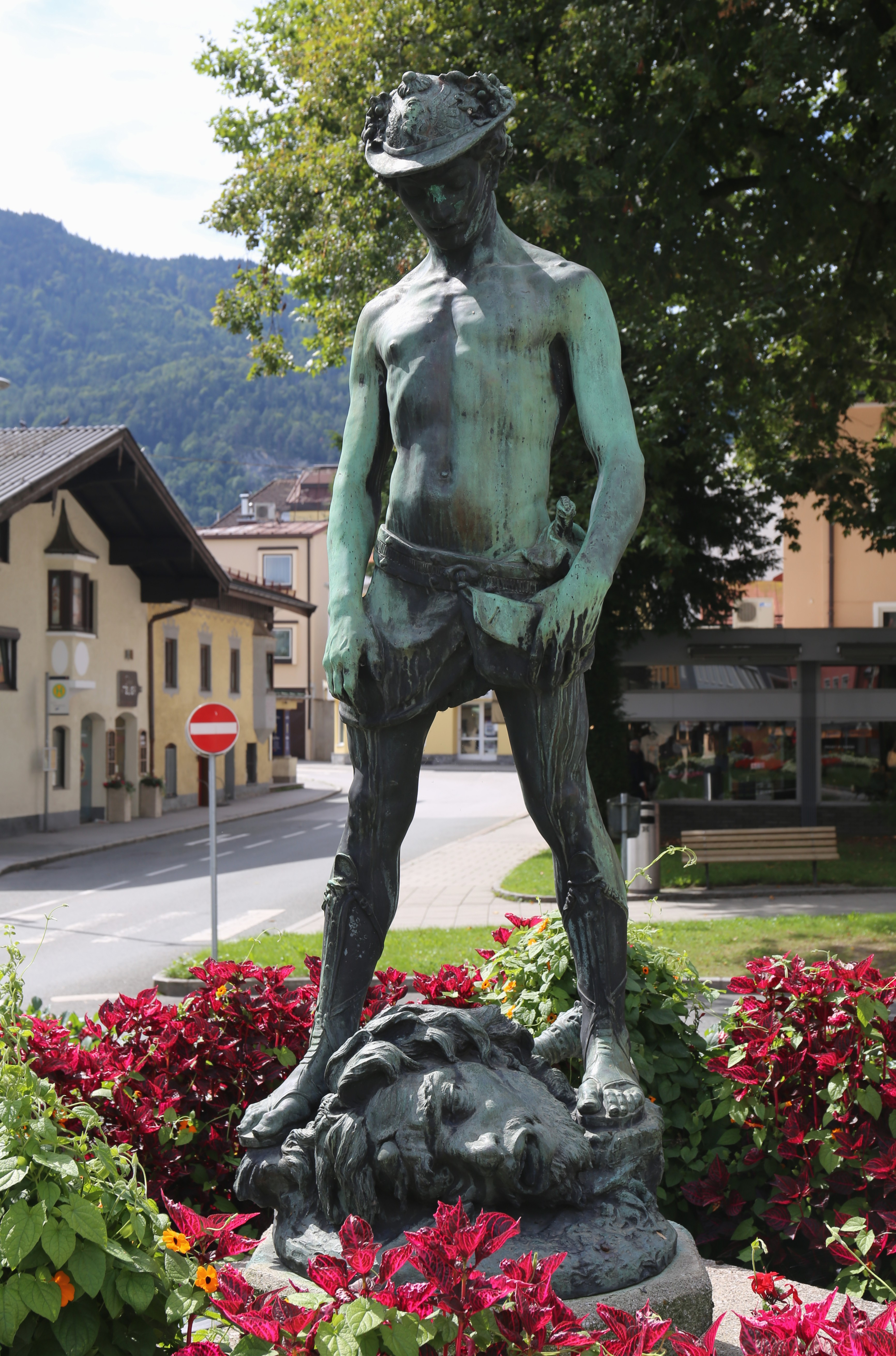 Franz Josef-Platz, Kufstein; Denkmal „David und Goliath“; das Denkmal „David und Goliath“ stammt von Josef Mühlbacher etwa um das Jahr 1920 This media shows the remarkable cultural object in the Austrian state of Tyrol listed by the Tyrolean Art Cadastre with the ID 83860. (on tirisMaps, pdf, more images on Commons, Wikidata)